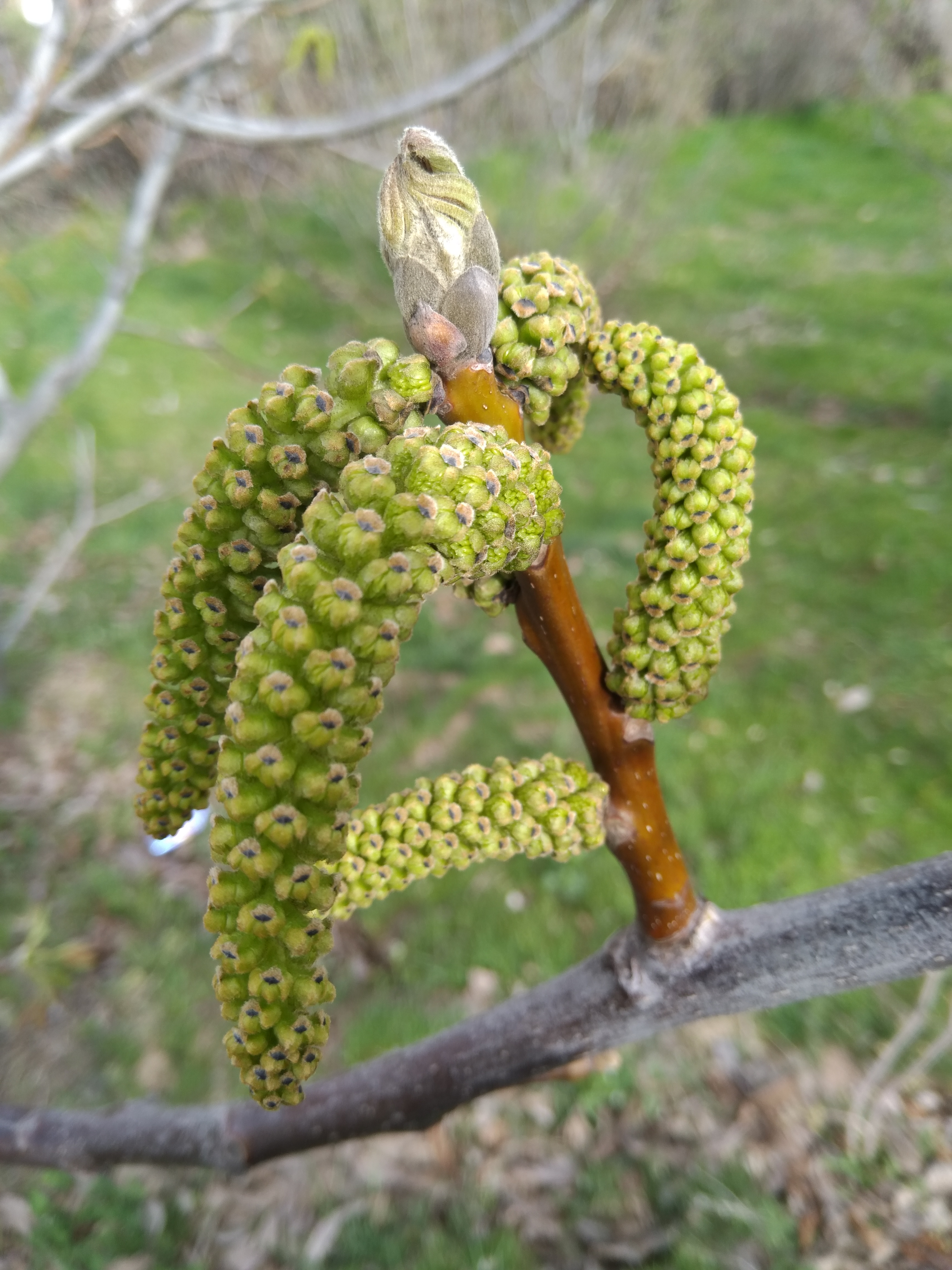 گل درخت گردو در فصل بهار که در تابستان به میوه گردو تبدیل می‌شود.